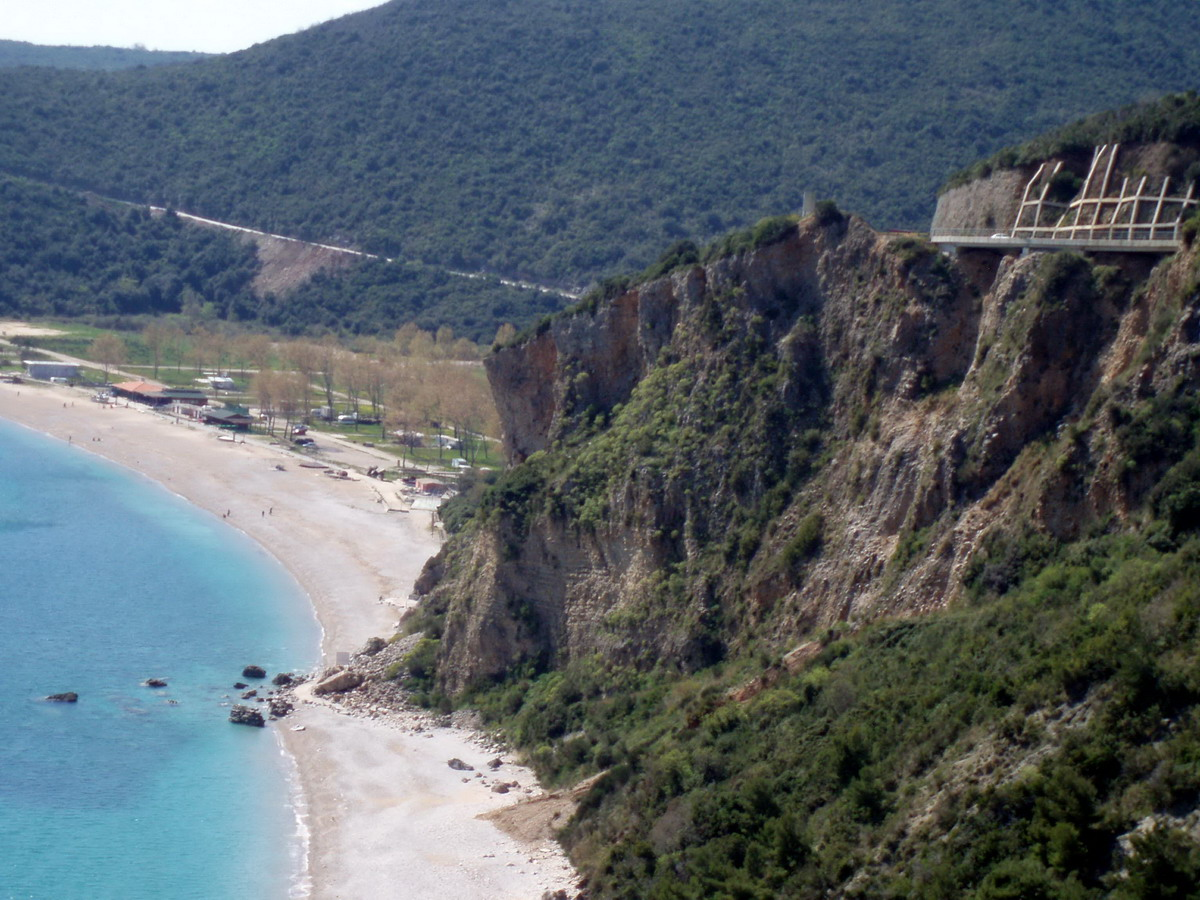 Beach Jaz (Montenegro).